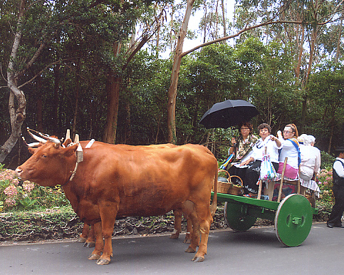 Carro de Bois com o condutor, Açores, Portugal.